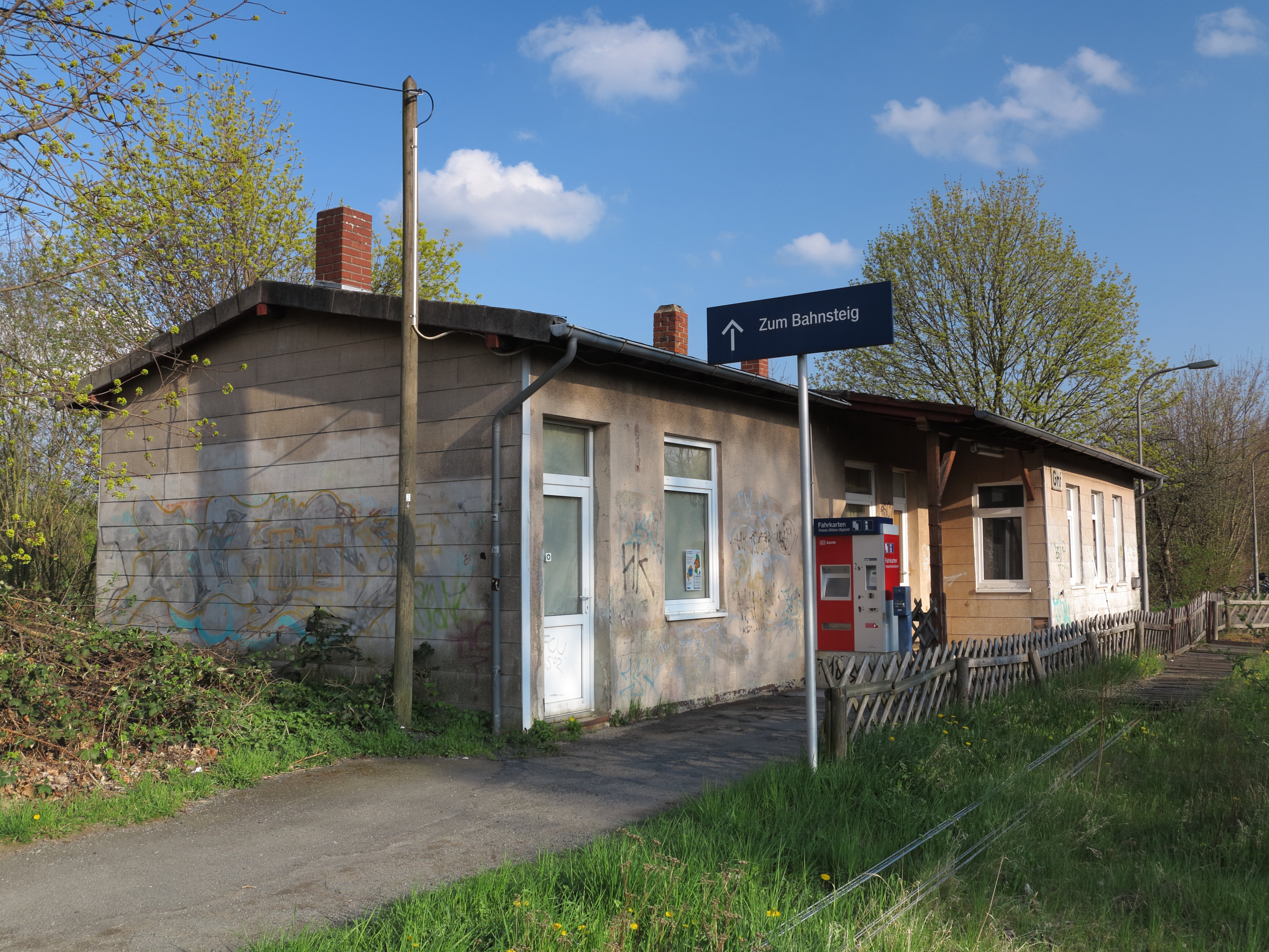 Das Dienstgebäude des Bahnhofs Braunschweig-Gliesmarode.